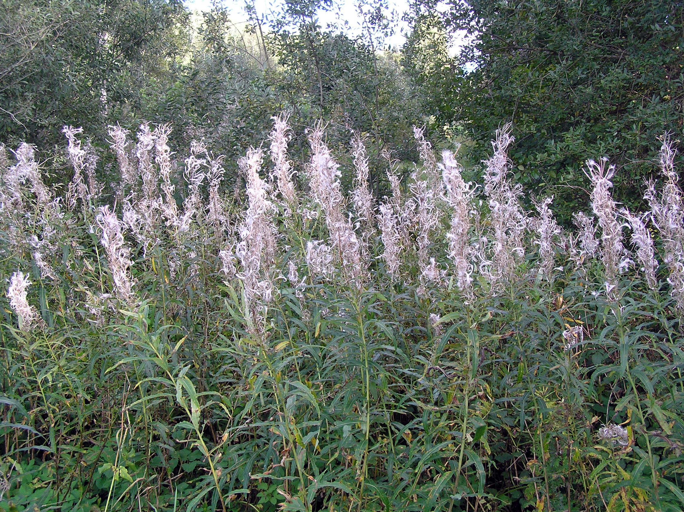 Ahtalehise põdrakanepi viljade valmimine